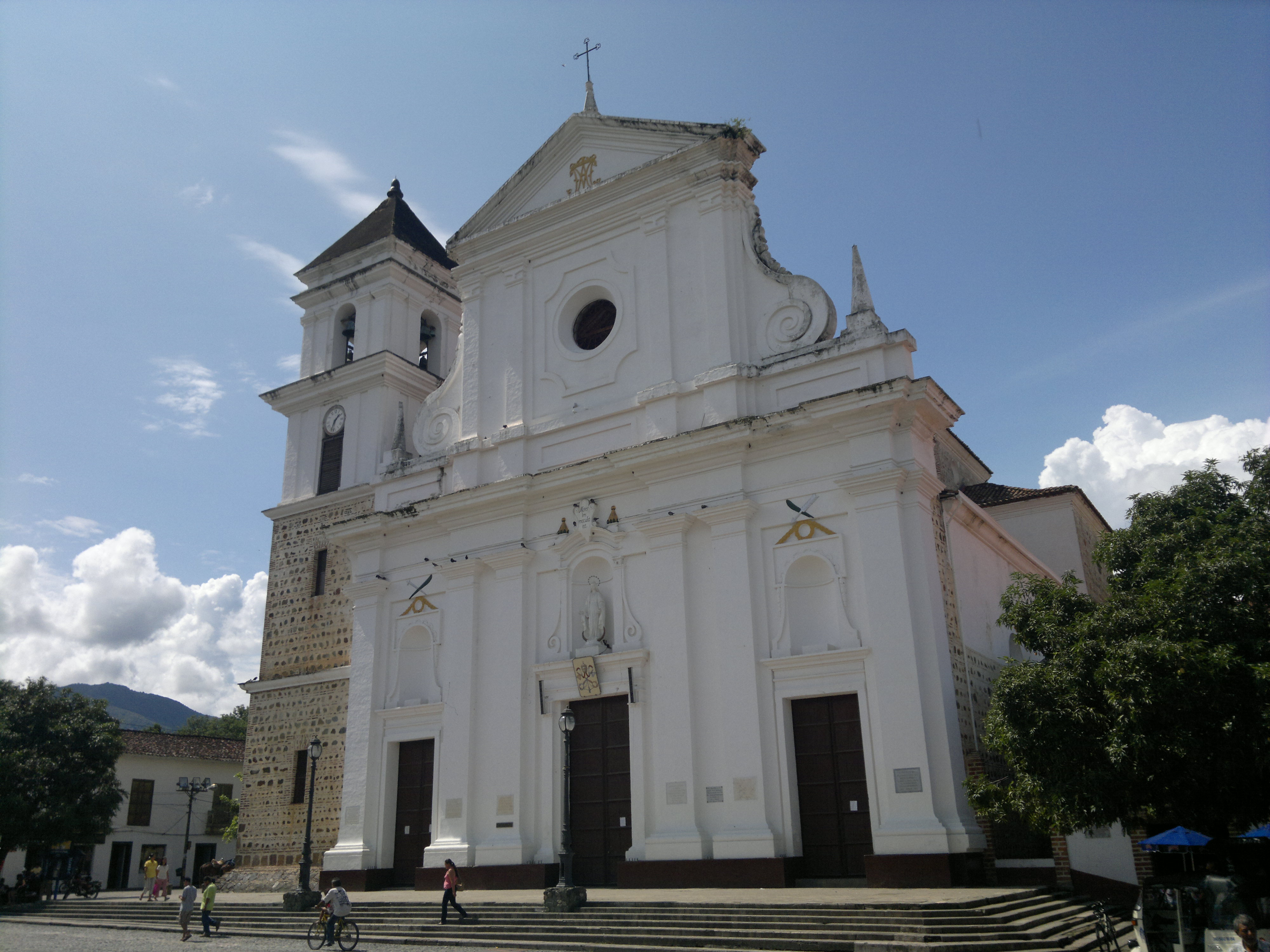 Sector Antiguo de la ciudad de Santa Fe de Antioquia: Catedral Basílica de la Inmaculada Concepción de Santa Fe de Antioquia. Vista frontal.